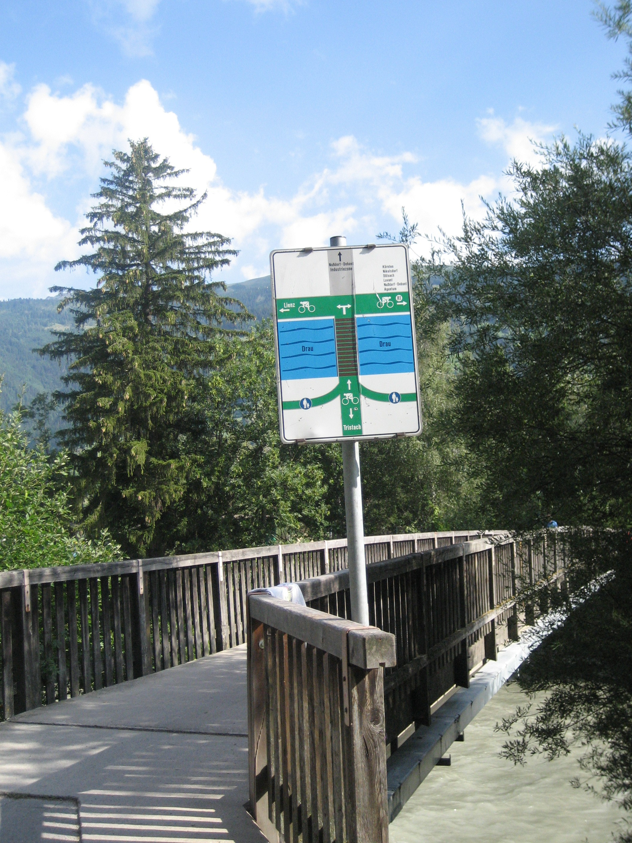 Drauradweg bei Tristach (AT)